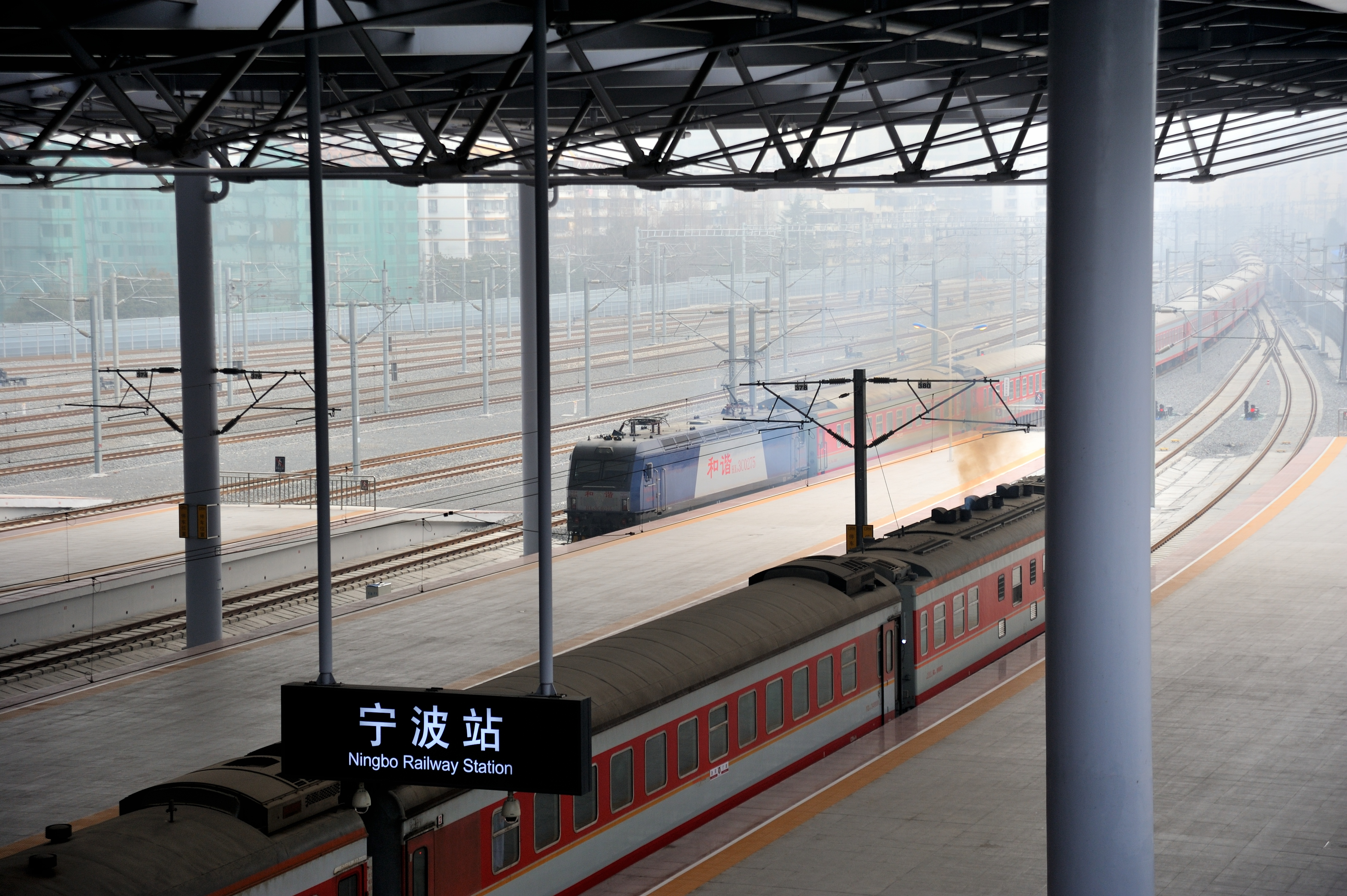 HXD3C-0275机车拖25G车体进入宁波站